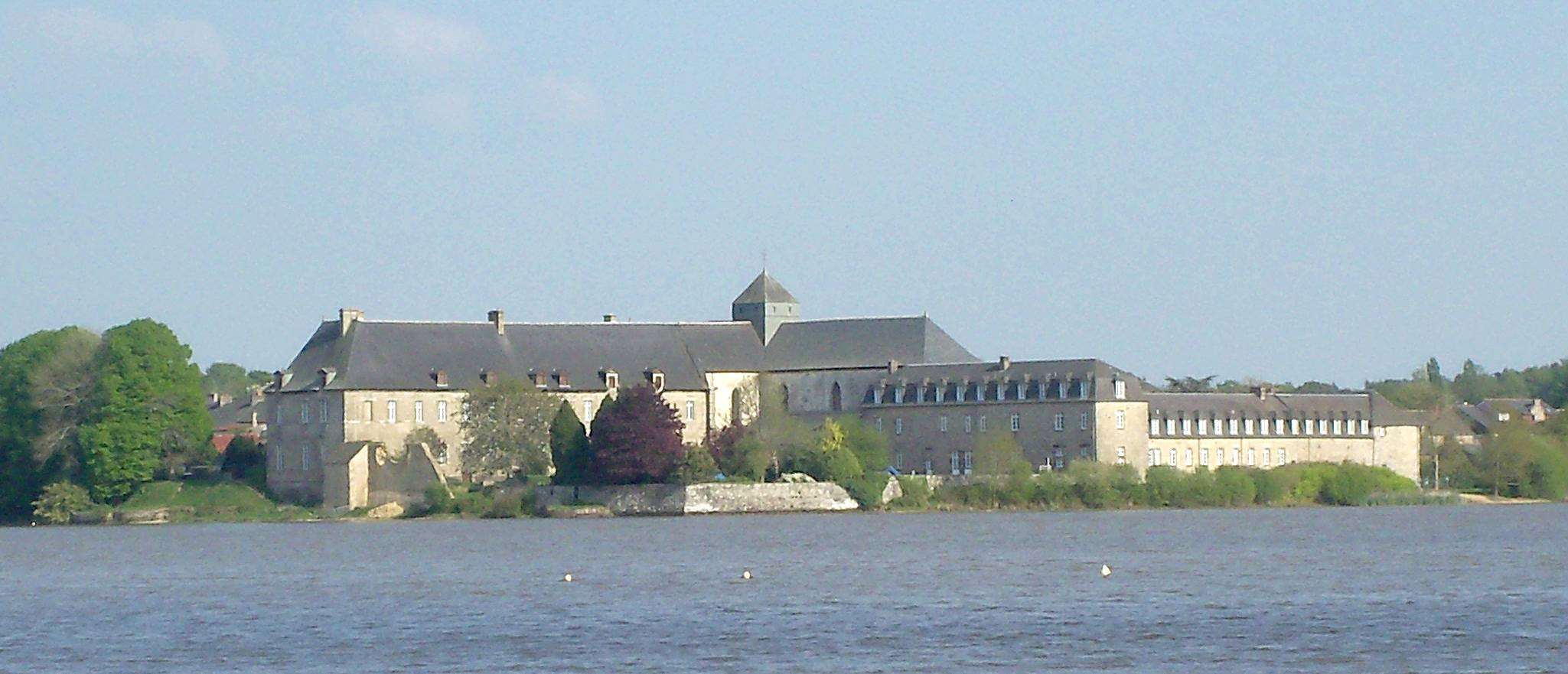 Arrière des batiments de l'Abbaye de Paimpont en Ille-et-Vilaine, France en avril 2011. Plan rapproché d'une autre photo téléchargée.